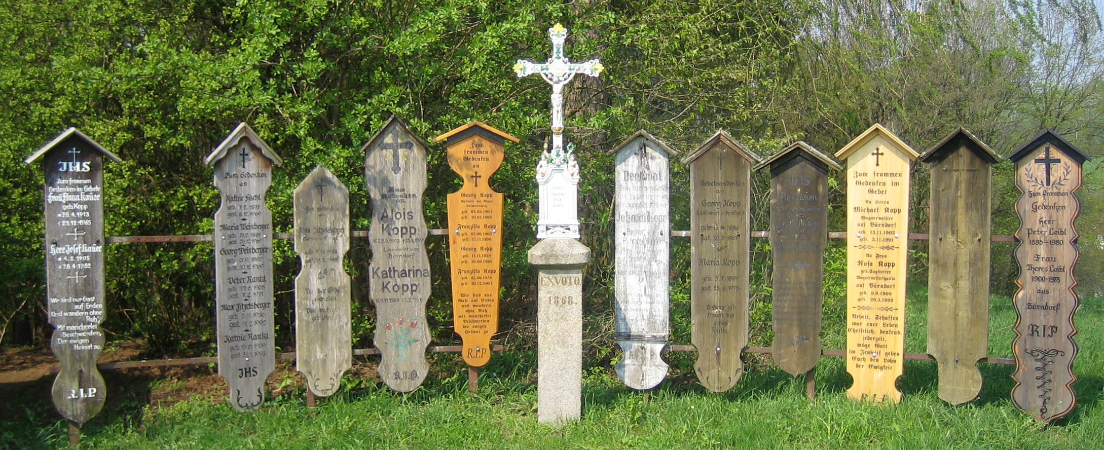 Totenbrettgruppe auf dem Kalvarienberg von Regen